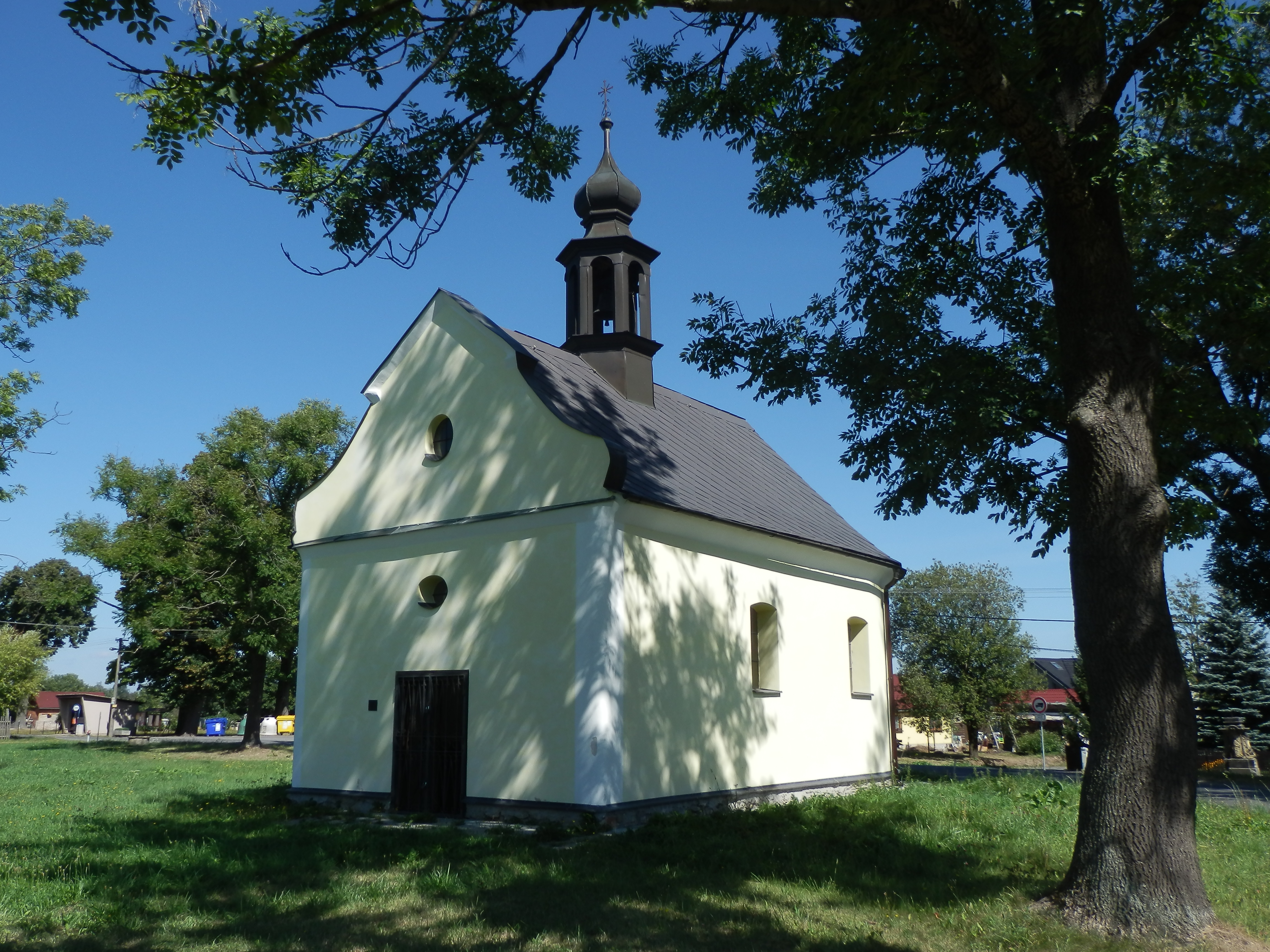 Kaple Cyrila a Metoděje (Ostrý Kámen), při hlavní silnici, Ostrý Kámen